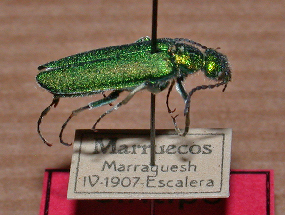 Halosimus robustus Escalera, 1925 (Coleoptera: Meloidae). Ejemplar perteneciente a la serie tipo de la especie. Colección de Entomología, MNCN. Fotografía: M. García-París.